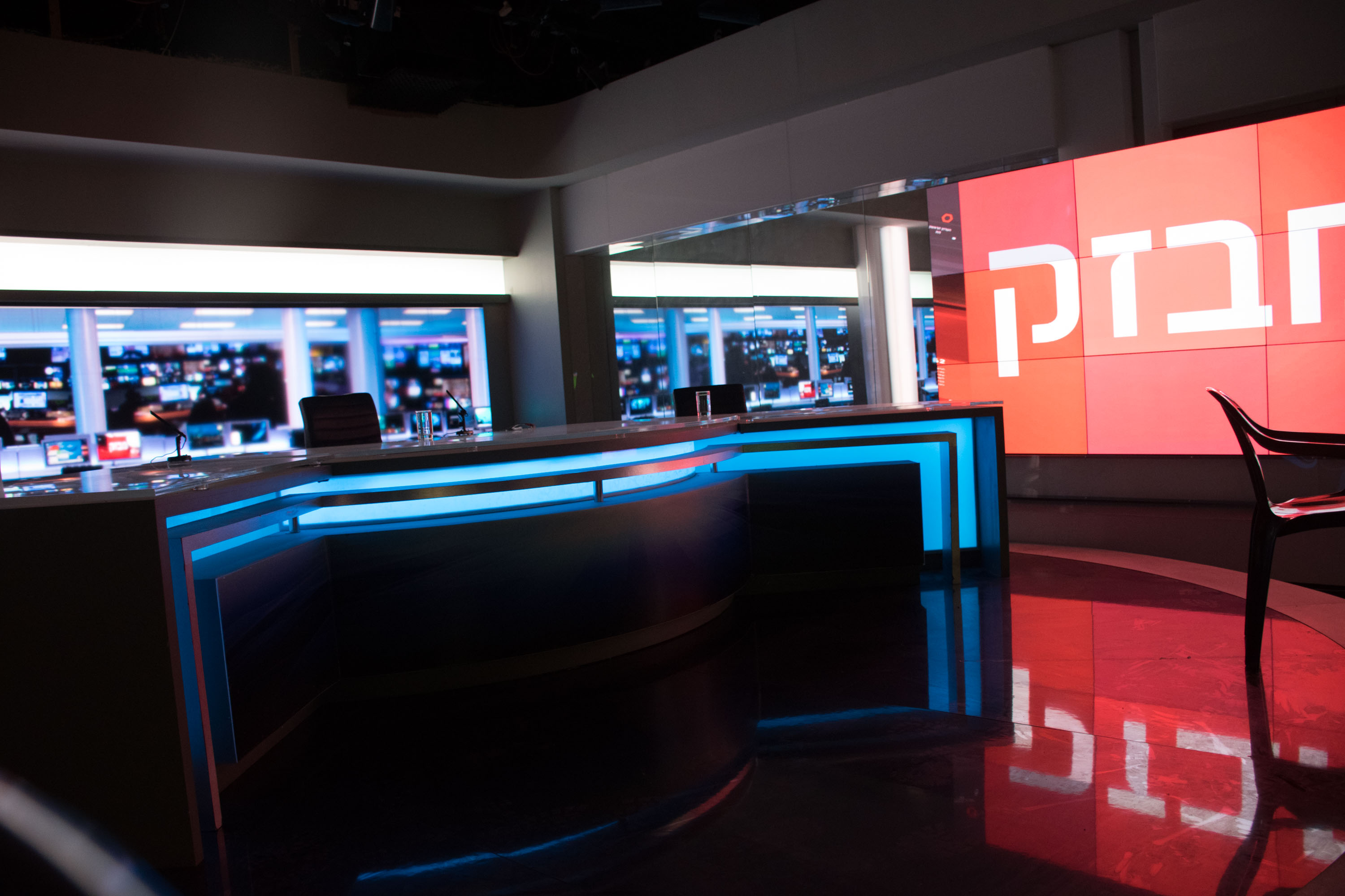 אולפן הערוץ הראשון